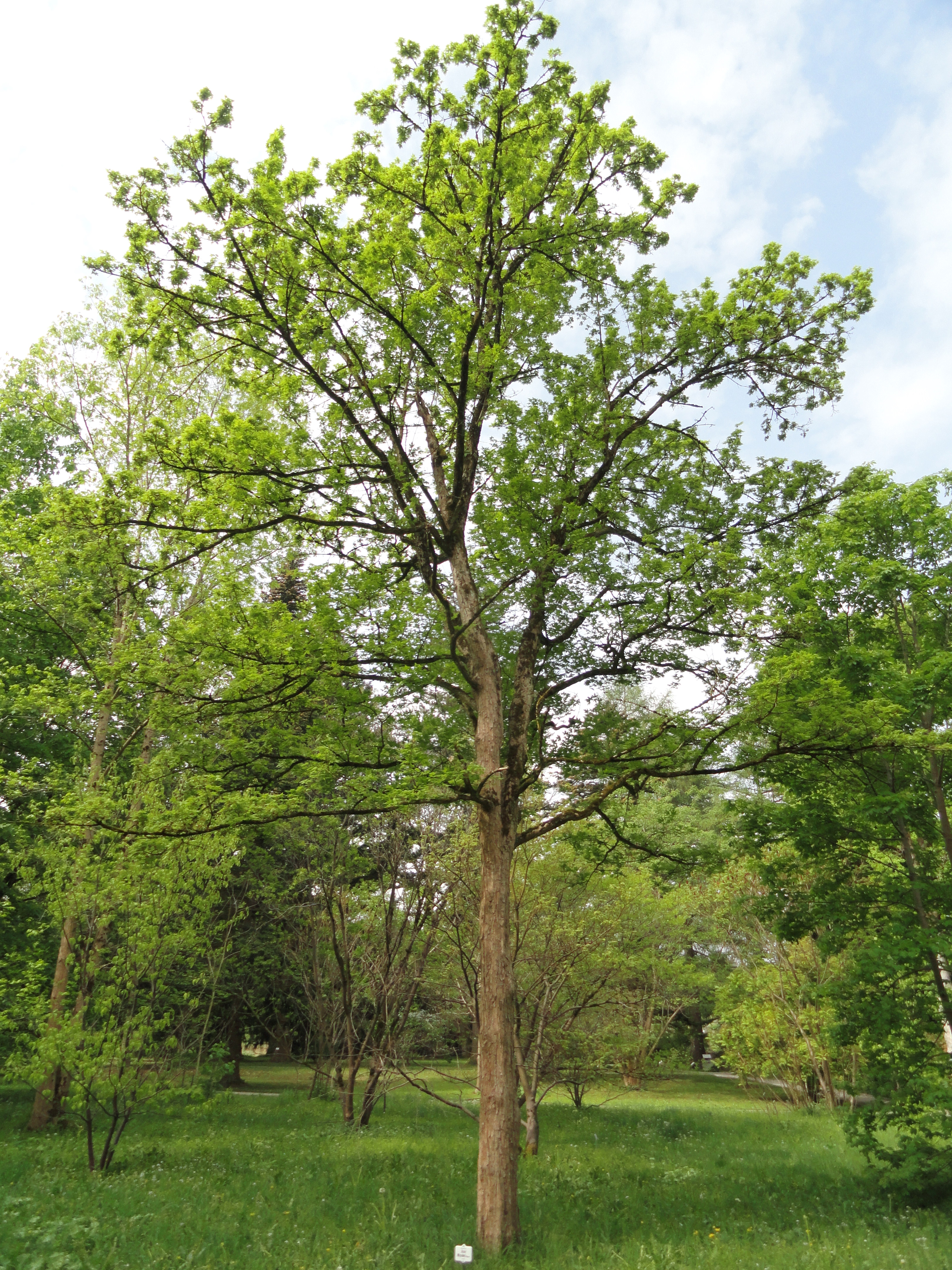 Acer miyabei specimen in the Botanischer Garten München-Nymphenburg, Munich, Germany.